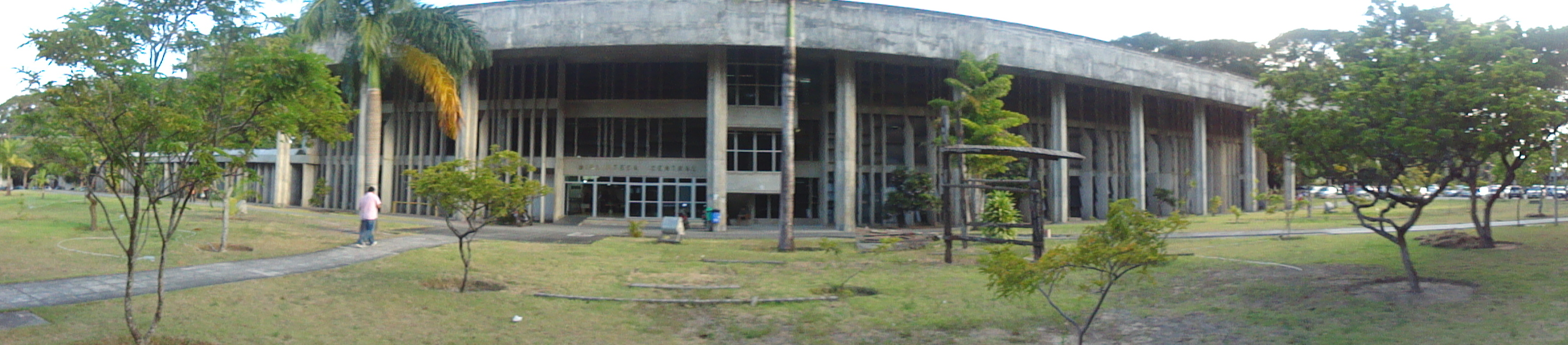 Biblioteca Central da UFPB